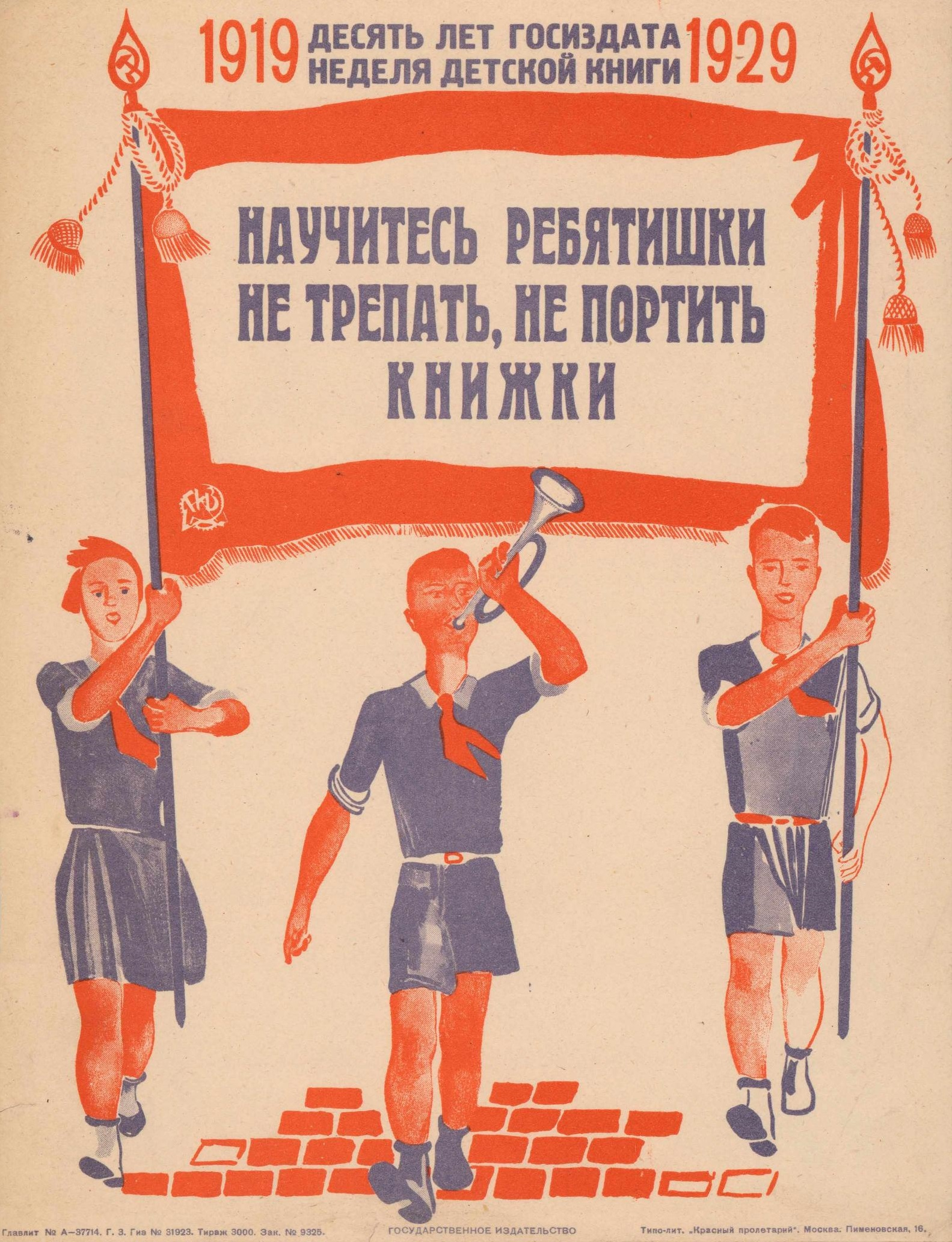 Плакат «Научитесь ребятишки не трепать, не портить книжки» из серии «Десять лет Госиздата. Неделя детской книги». Москва: Государственное издательство, [1929]. Хромолитография, 36×27 см. 3 000 экз.